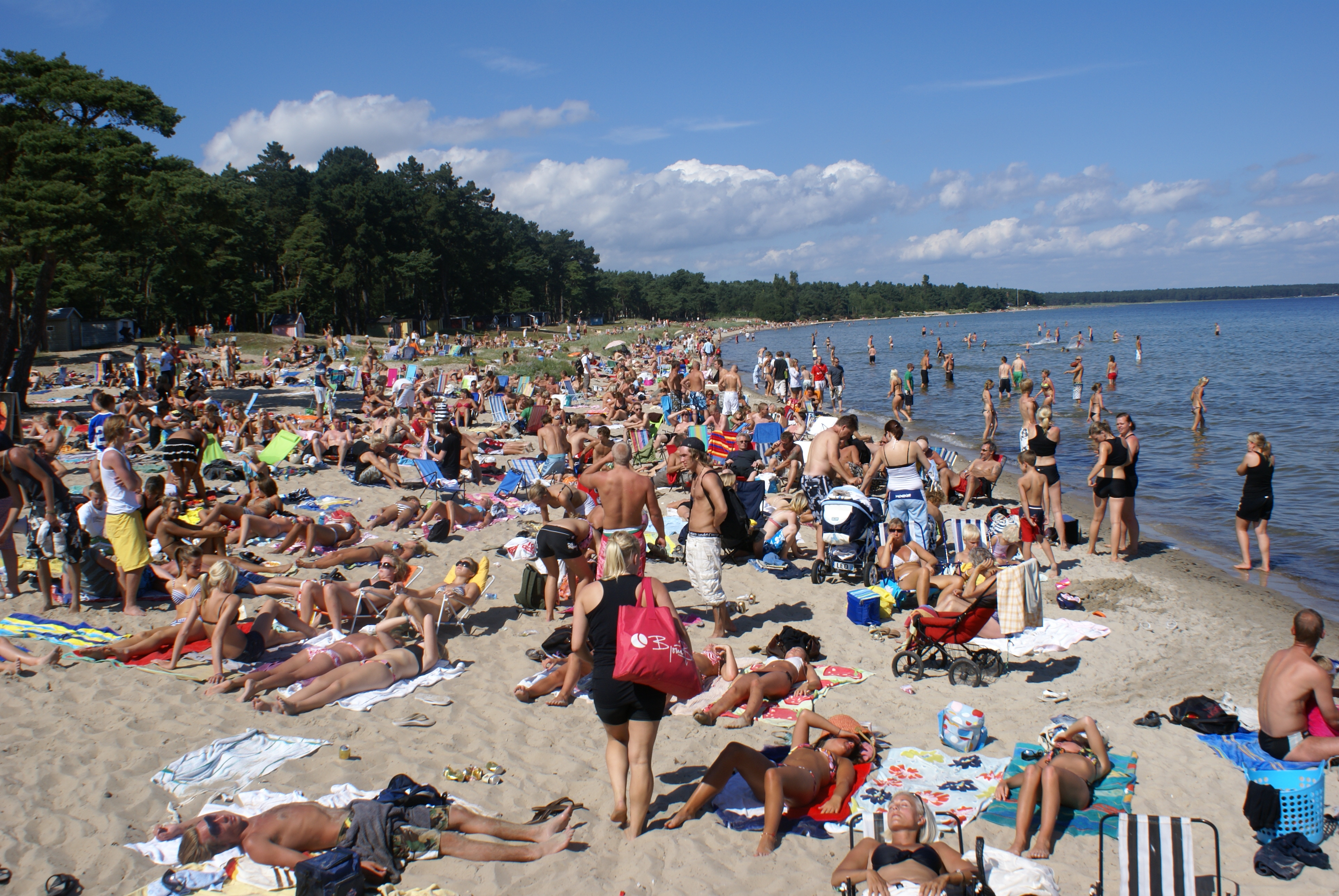 Strand Täppet in Åhus im Juli 2007